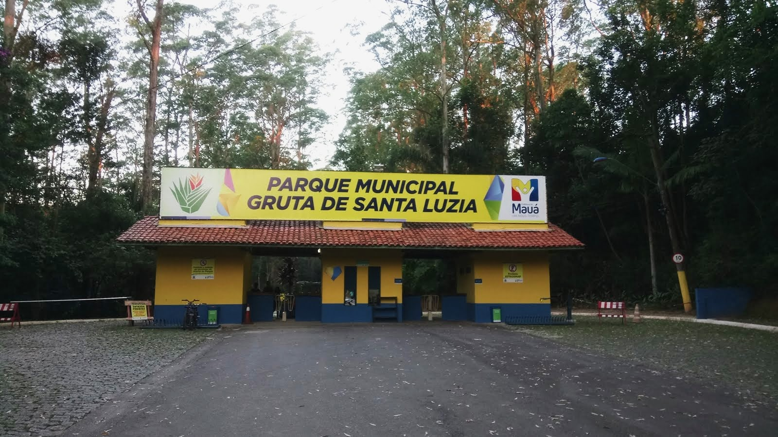 Entrada do Parque Ecológico Gruta Santa Luzia